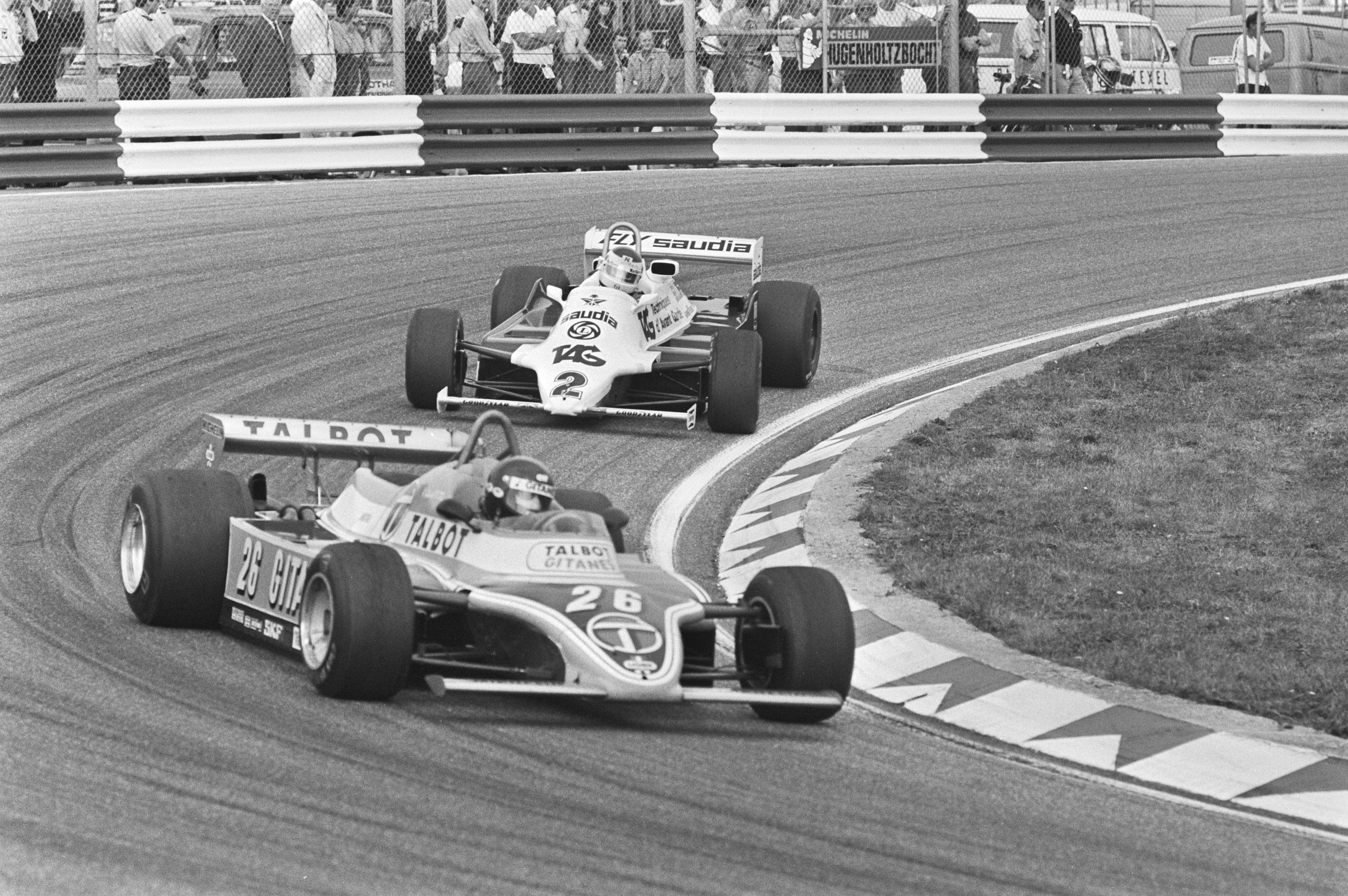 Collectie / Archief : Fotocollectie Anefo Reportage / Serie : Grand Prix Zandvoort, Grote Prijs van Nederland Beschrijving : Op de voorgrond de Franse coureur Jacques Lafitte in een Ligier-Matra gevolgd door Argentijn Carlos Reutemann met Williams-Ford tijdens de Grand Prix Formule 1 op Zandvoort Datum : 30 augustus 1981 Locatie : Noord-Holland, Zandvoort Trefwoorden : Grand Prix Zandvoort, Grote Prijs van Nederland, autocoureurs, circuits, raceauto's, races, wedstrijden Persoonsnaam : Lafitte, Jaques, Reutemann, Carlos Fotograaf : Dijk, Hans van / Anefo, [onbekend] Auteursrechthebbende : Nationaal Archief Materiaalsoort : Negatief (zwart/wit) Nummer archiefinventaris : bekijk toegang 2.24.01.05 Bestanddeelnummer : 931-6509